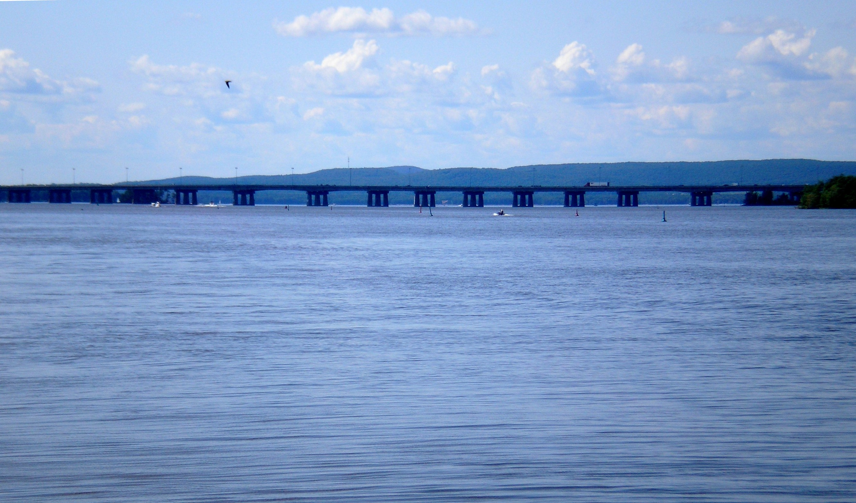 Pont de l'Île-aux-Tourtes à l'ouest de Montréal au-dessus du lac des Deux-Montagnes (autoroute 40).